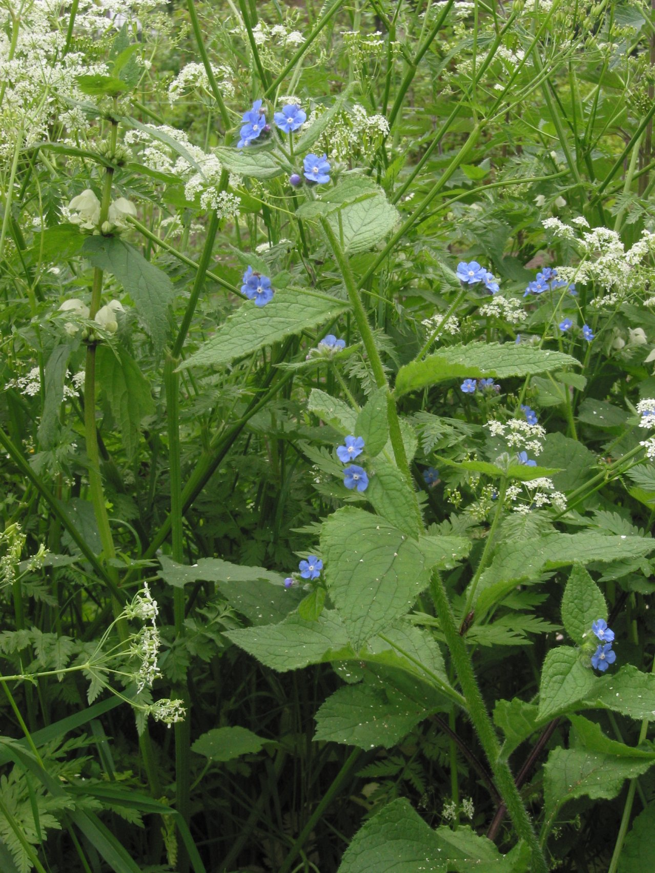 (Overblijvende ossentong)Pentaglottis sempervirens